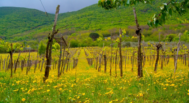 Un vigneto sulle pendici del Camposauro a Solopaca (BN)